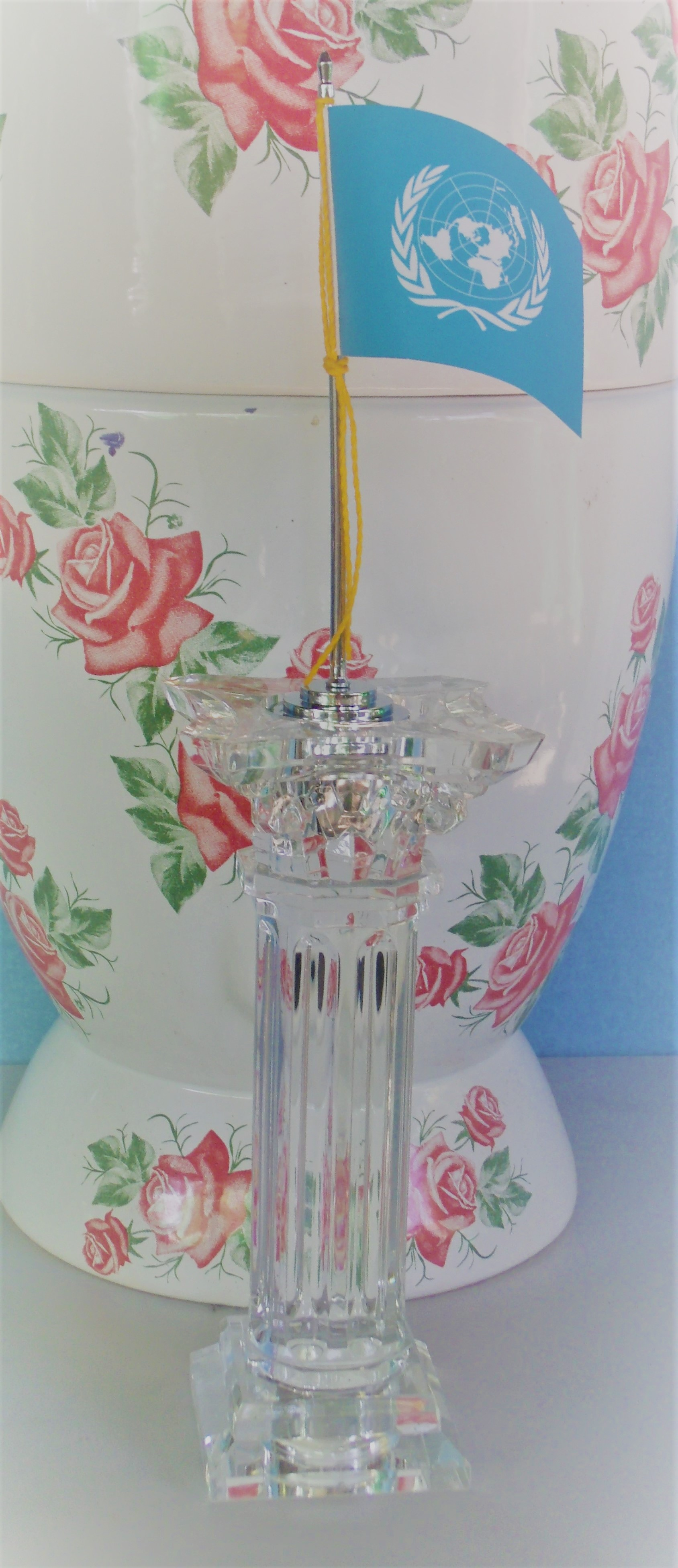 Mini bandeira da ONU com elementos florais em louça.